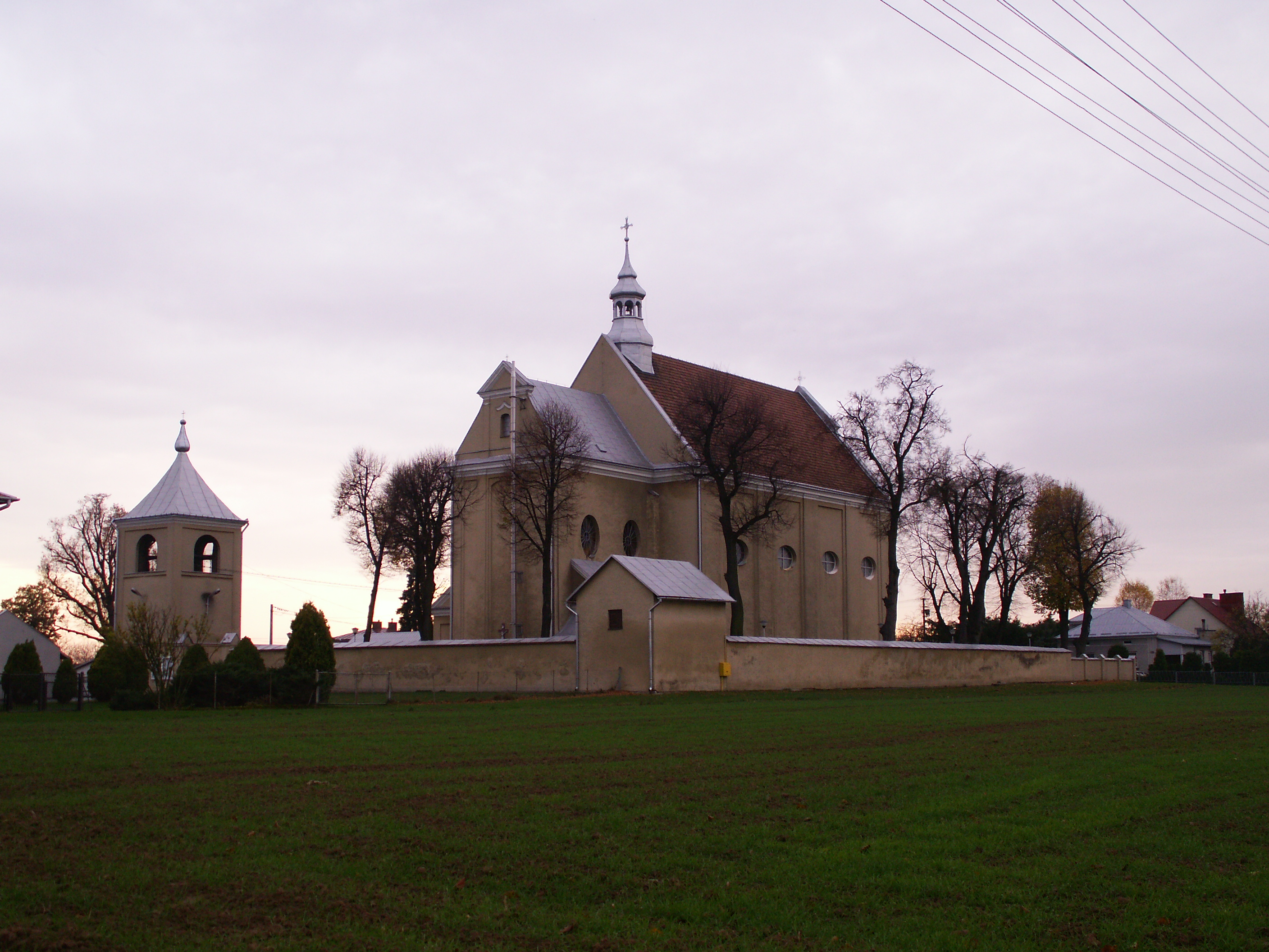 Kościół parafialny p.w. św. Onufrego w Łące (zabytek nr 929 z 28.10.1975)